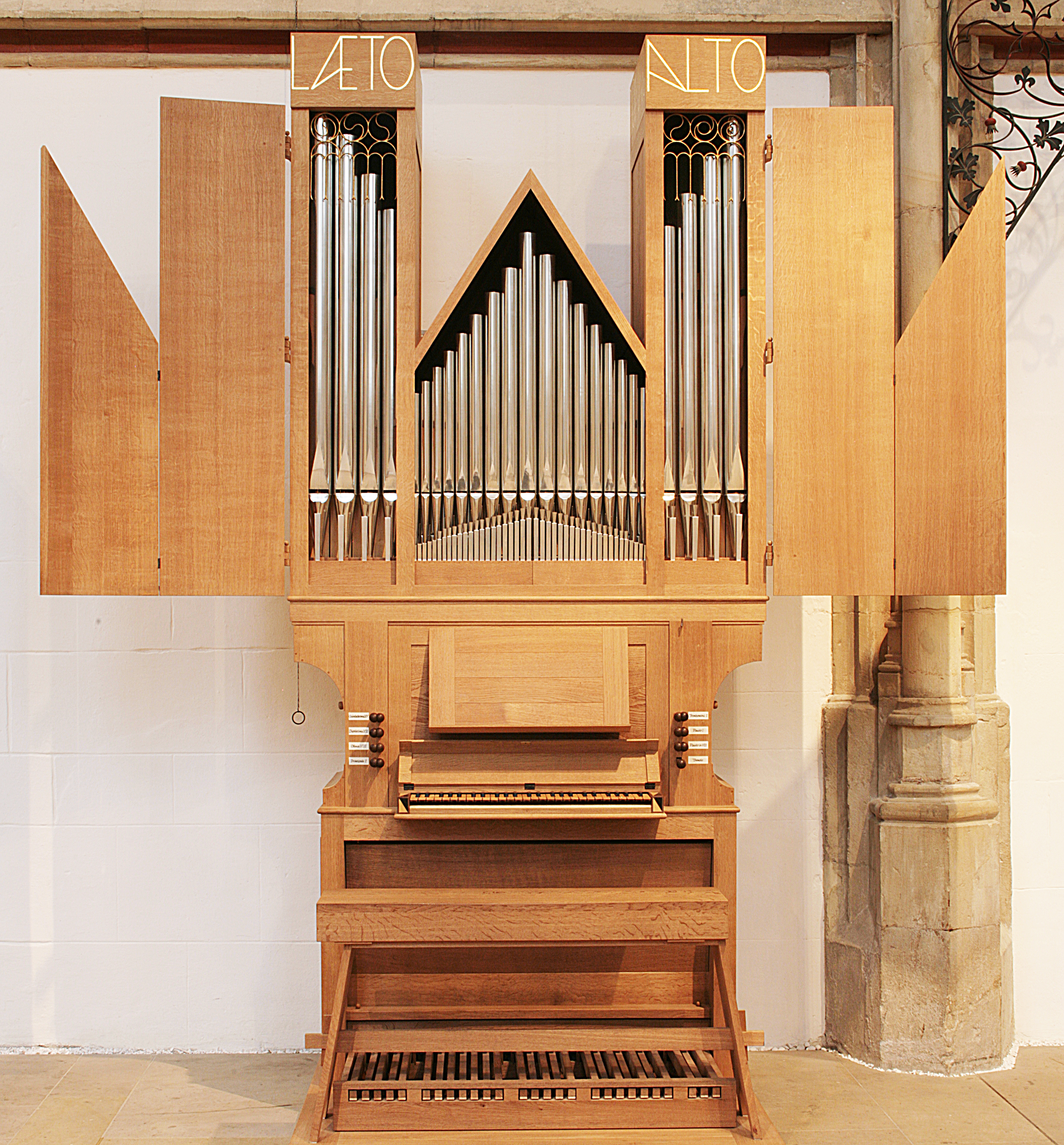 Orgel von St. Lamberti Münster/Westfl., Nordrhein-Westfalen, Deutschland